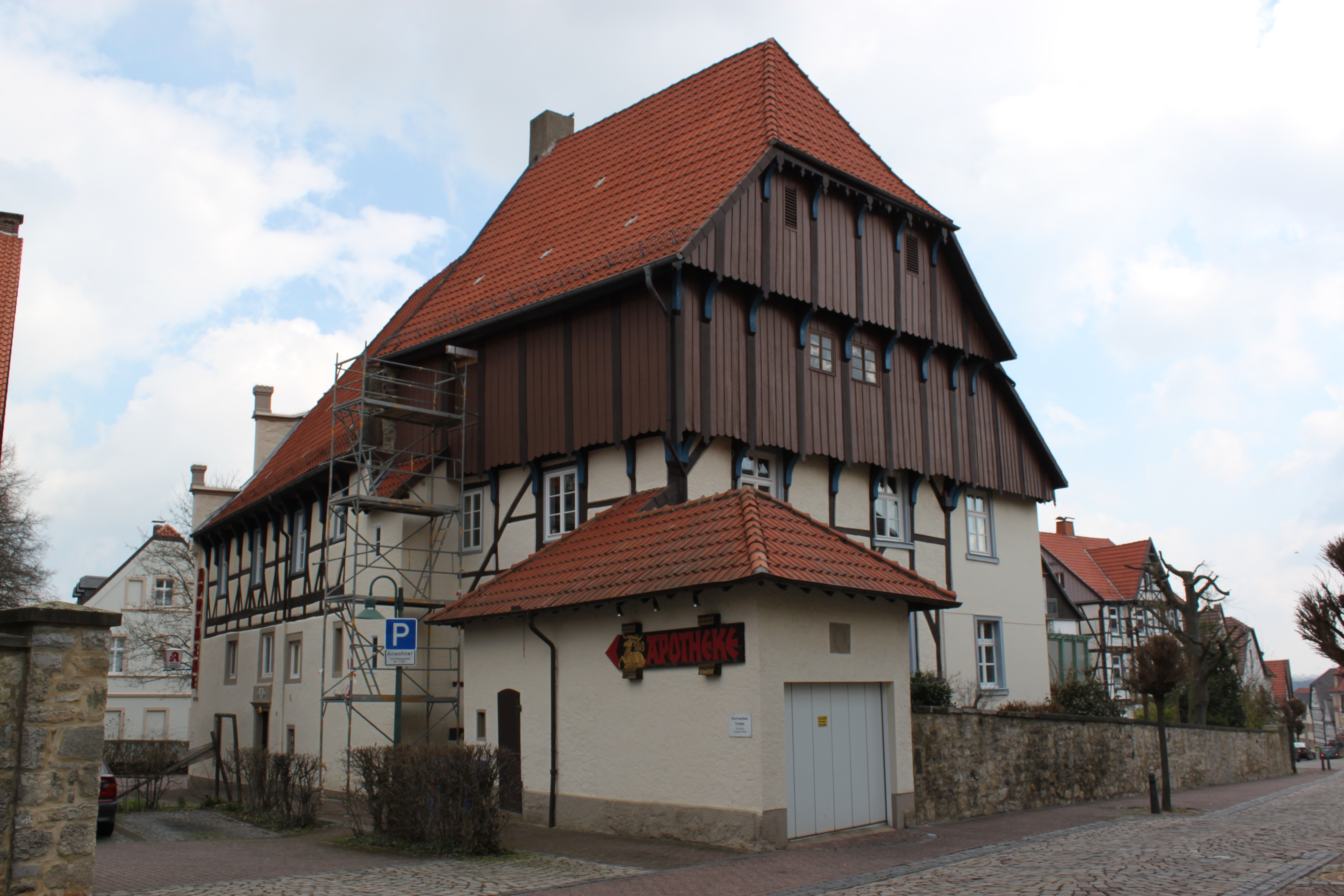 Warburg, Kalandstraße 5 (ehem. Hirschapotheke)